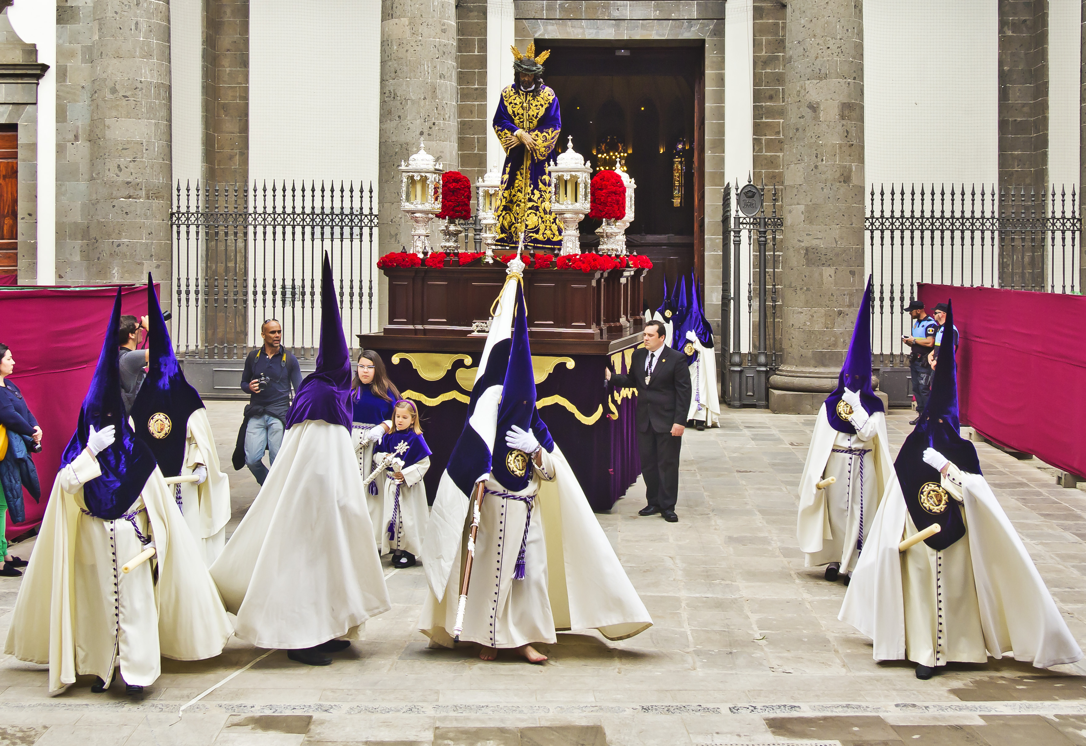 Real Hermandad y Cofradía de Nuestro Padre Jesús de la Sentencia y María Santísima de la Amargura